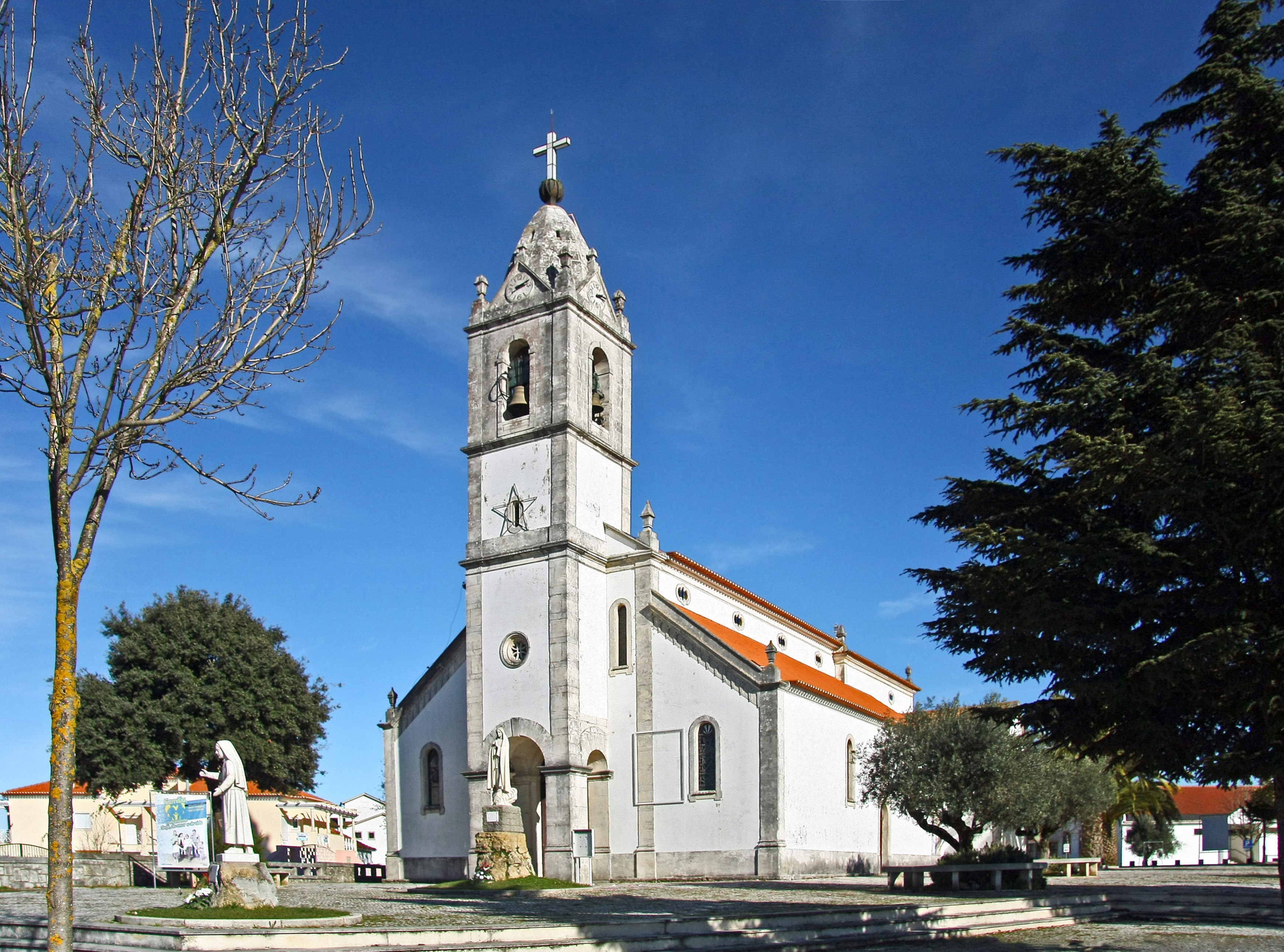 Aí, os videntes foram baptizados e fizeram a sua inserção na comunidade cristã. À entrada, do lado esquerdo da porta principal, encontra-se a Pia Baptismal onde os três pastorinhos Lúcia, Francisco e Jacinta foram baptizados.